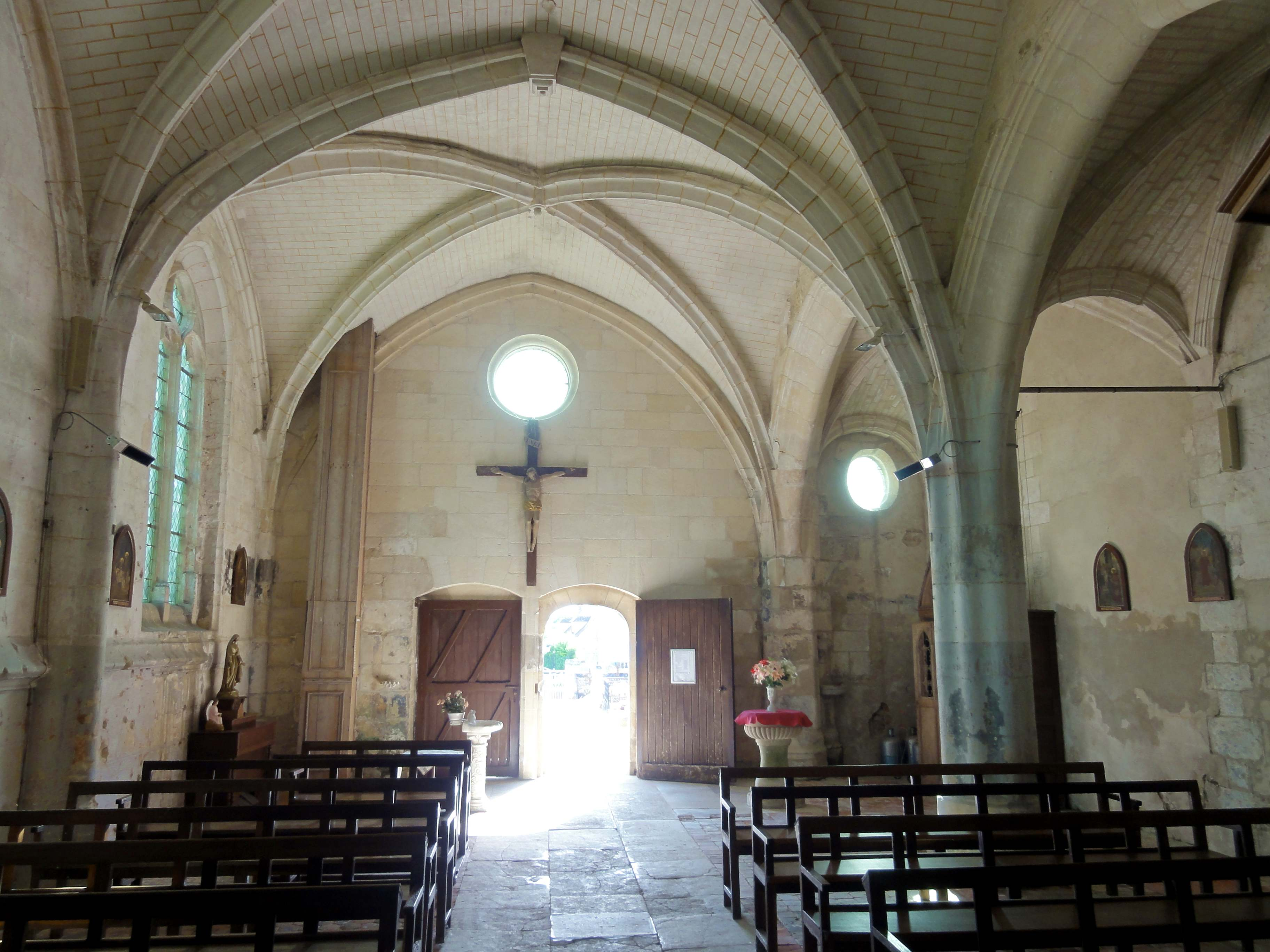 Intérieur de l'église Saint-Wandrille de Rivecourt (voir titre).